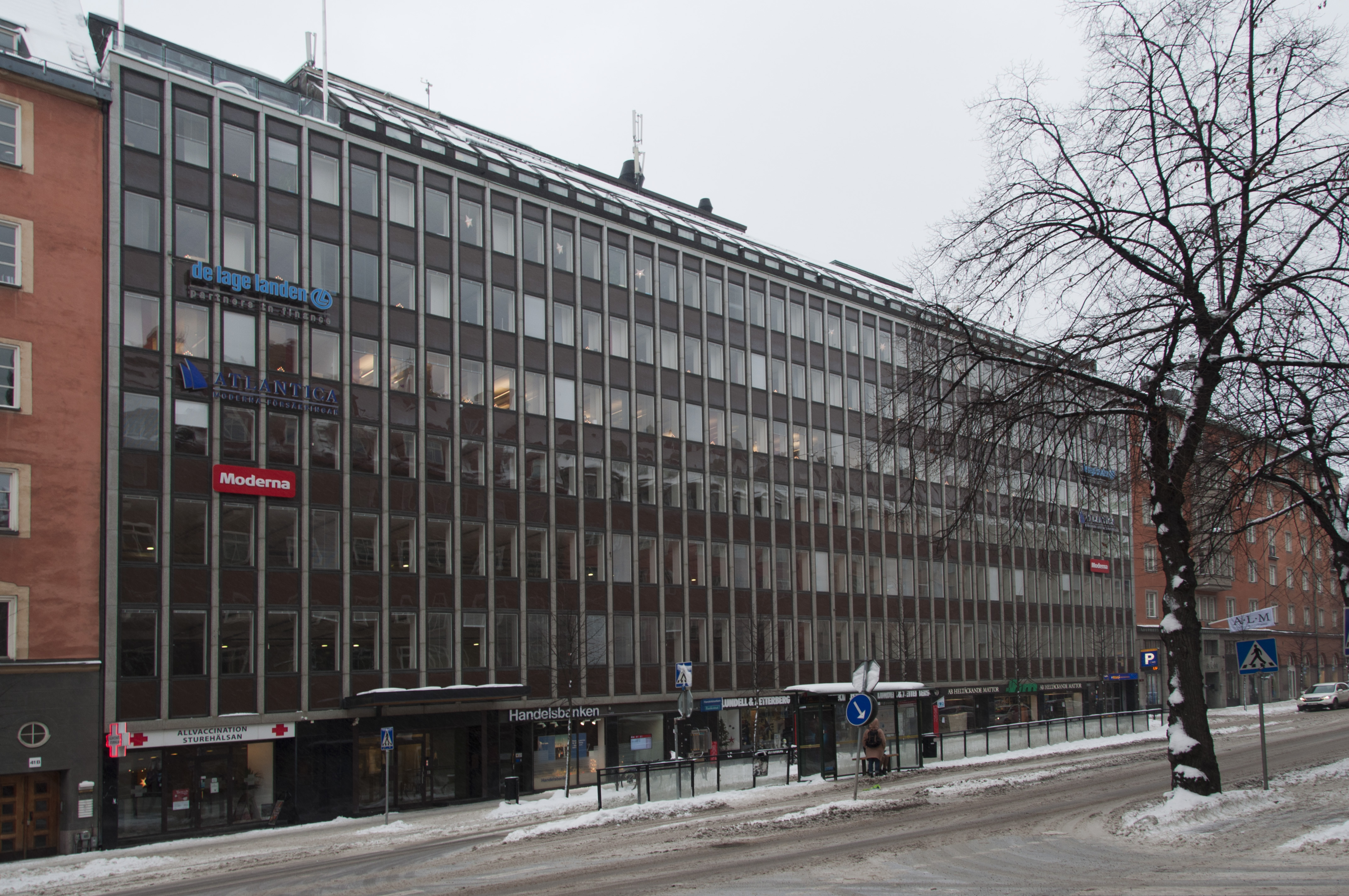 Birger Jarlsgatan 43, Byggnadsår 1960, arkitekt Zimdals Arkitektkontor, byggherre Försäkrings AB Valand